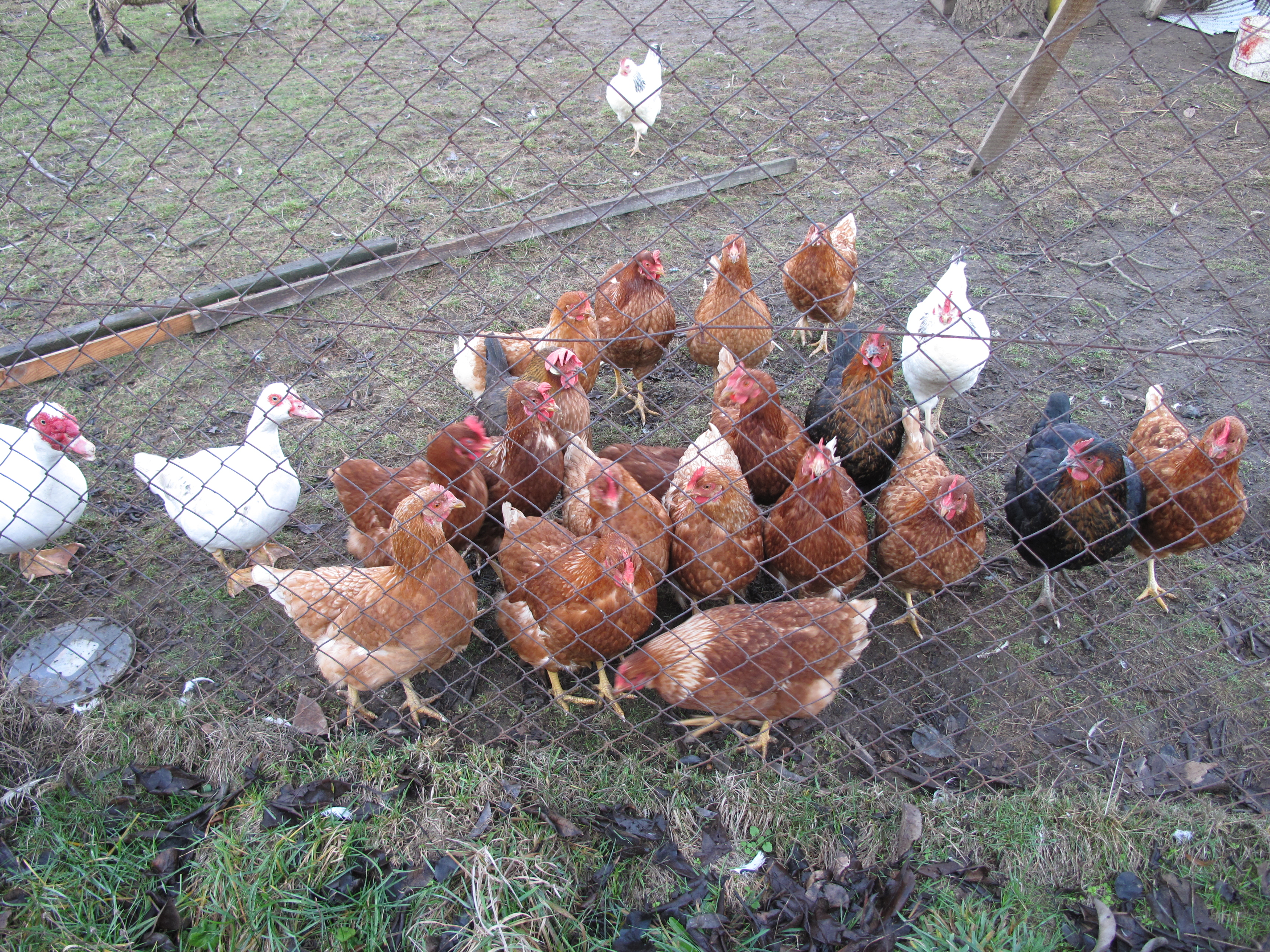 Slepice v Čelákovech. Okres Plzeň-jih, Česká republika.